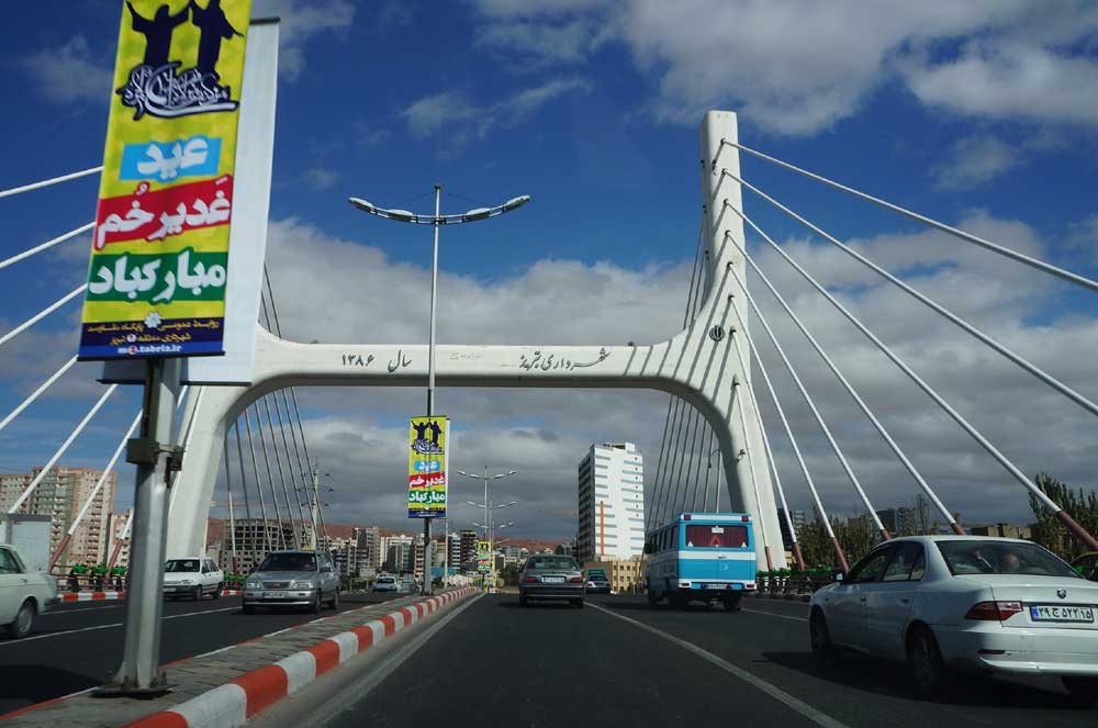 Tabriz, Iran